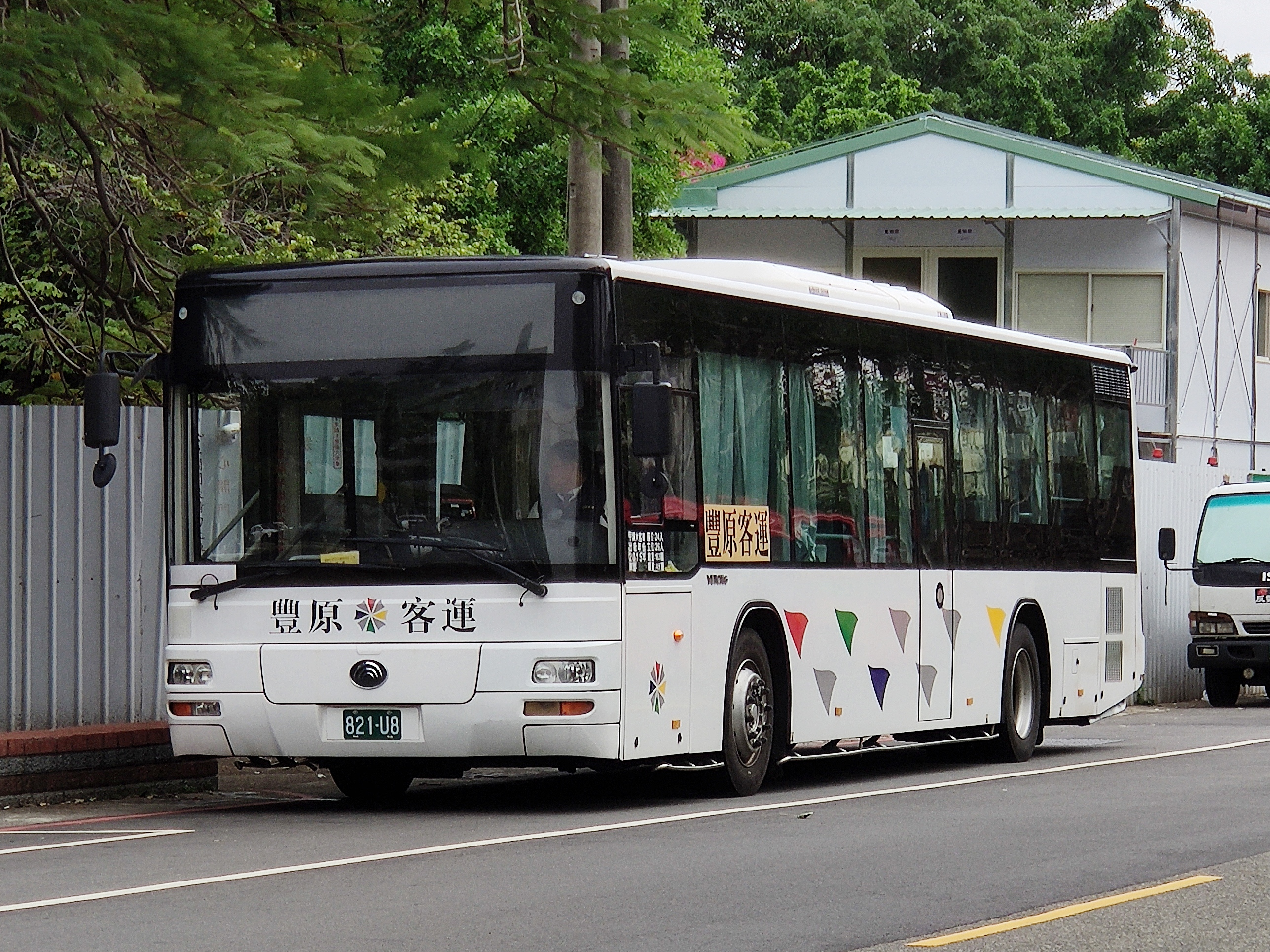 豐原客運 宇通ZK6128HG大客車 821-U8